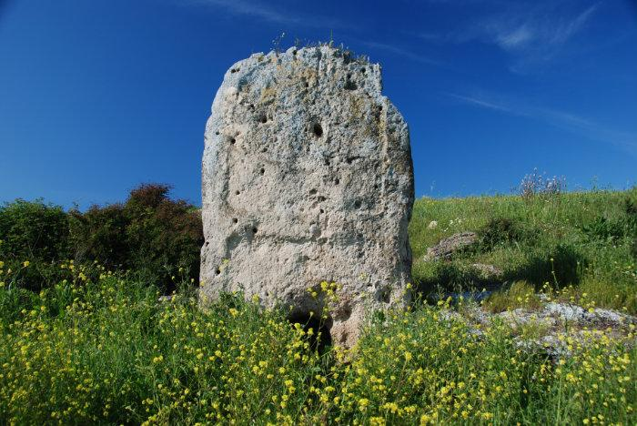 Domus de janas di Tana di lu Mazzoni